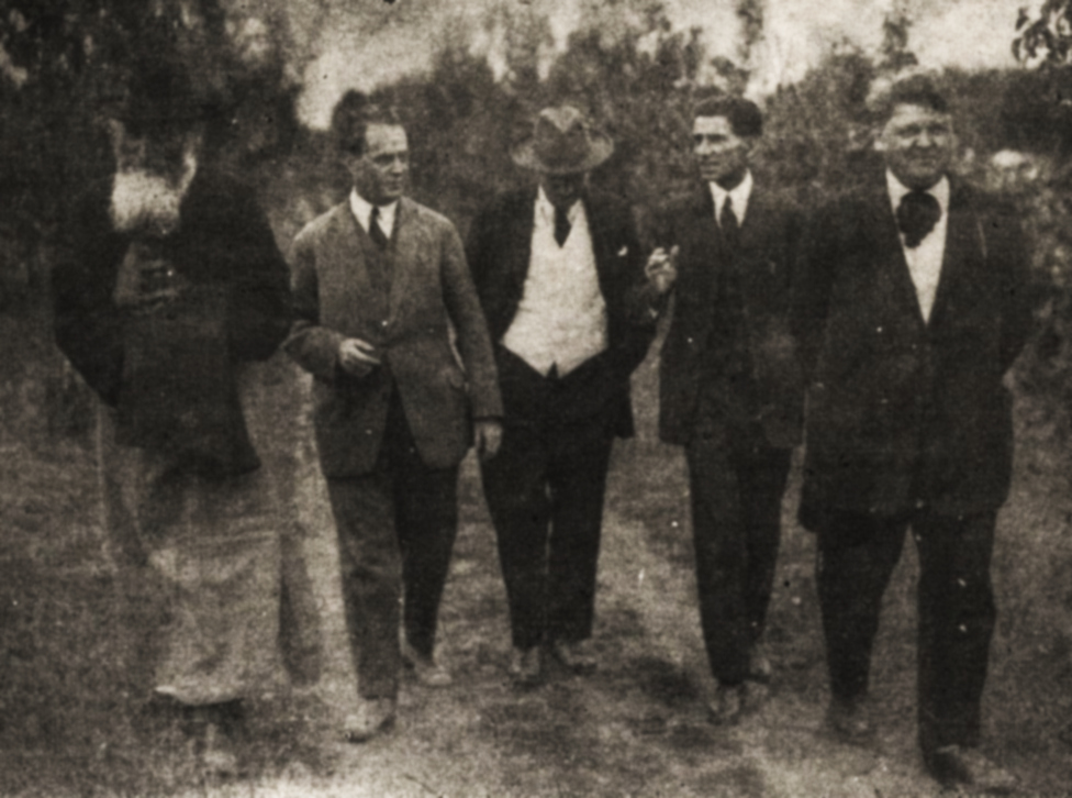 Gala Galaction, I. Rosenthal, D.D. Pătrășcanu, Panait Istrati și Mihail Sadoveanu (1880-1961) în grădina casei din Copou a lui Sadoveanu. Fotografie executată după un clișeu existent la Muzeul de literatură al Moldovei din Iași.